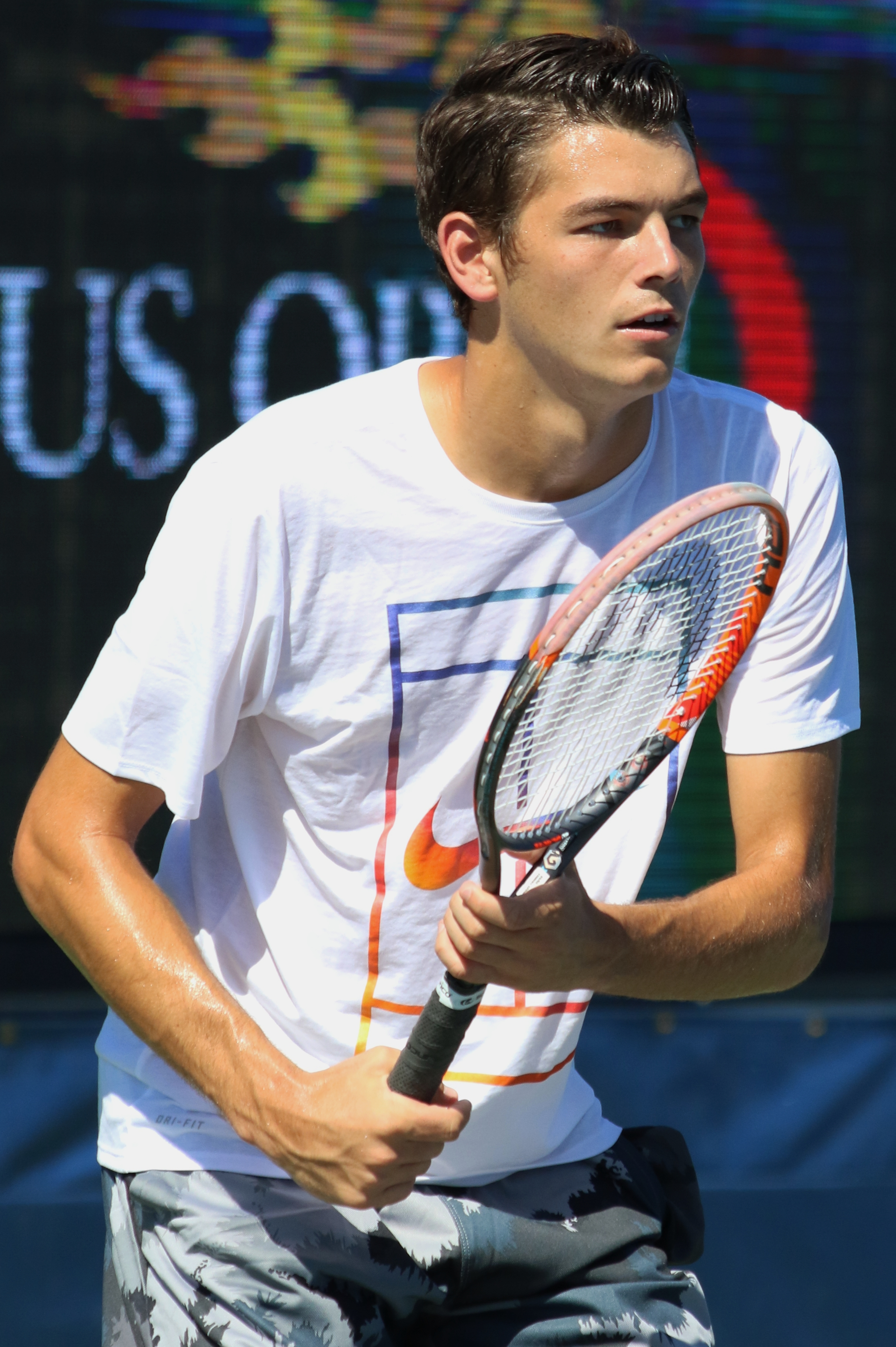 Fritz US16 (12)